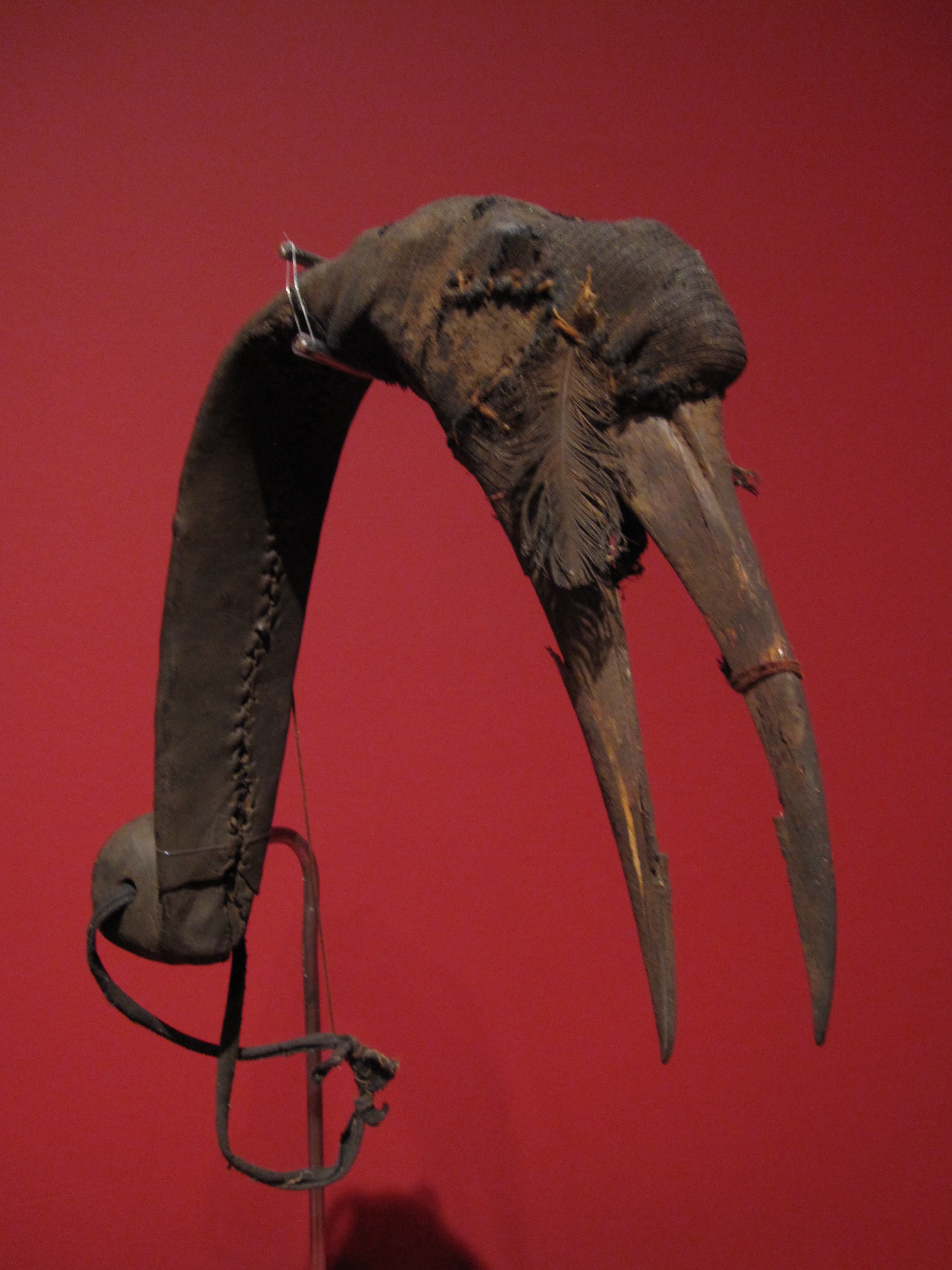 Jagdmaske burtu, Hausa oder Nupe, Nigeria, 20. Jh. Holz, Leder, Textimaske, Federn, Abrusbohnen. Wien Museum für Völkerkunde. Die Jagdmaske wird mit einem Band vor die Stirn gebunden, und der Träger ahmt die Bewegung des Hornrabenvogels nach, um das Wild wegen der vermeintlichen Anwesenheit des Vogels in Sicherheit zu wiegen.